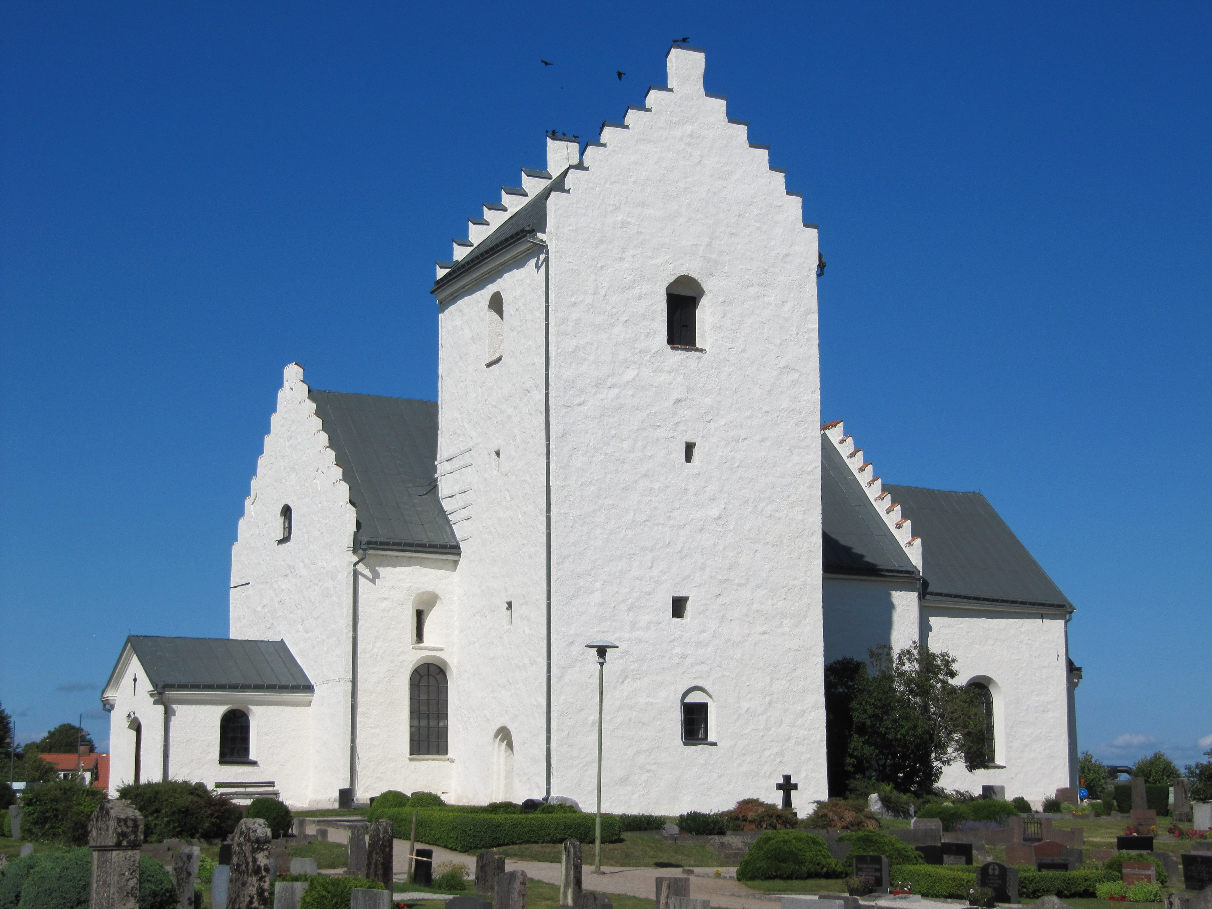 Knislinge kyrka